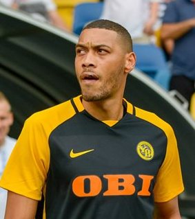 Гійом Оаро - французький футболіст Янг Бойза